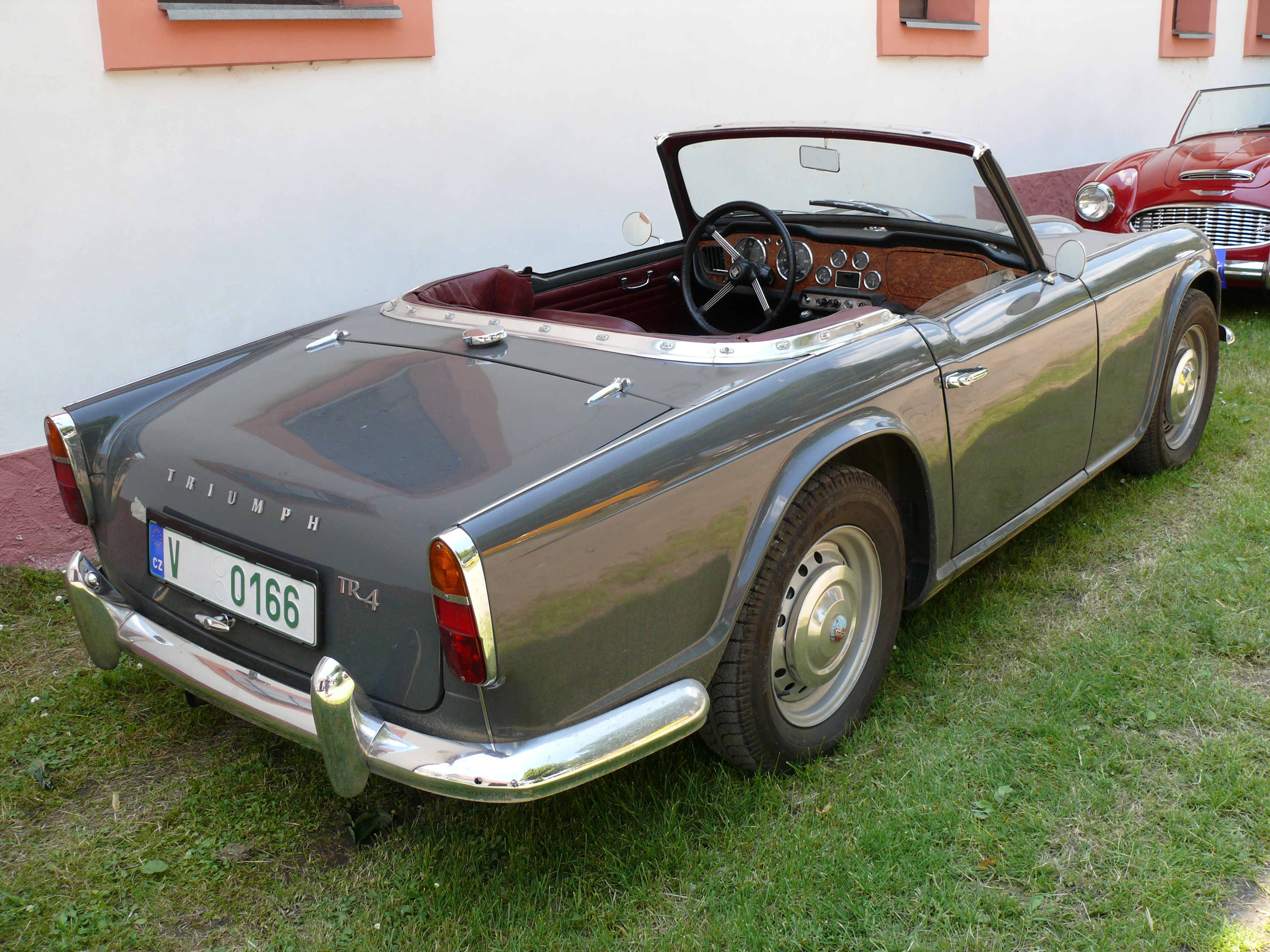 Triumph TR4, Veteránské rojení Lešno 2007